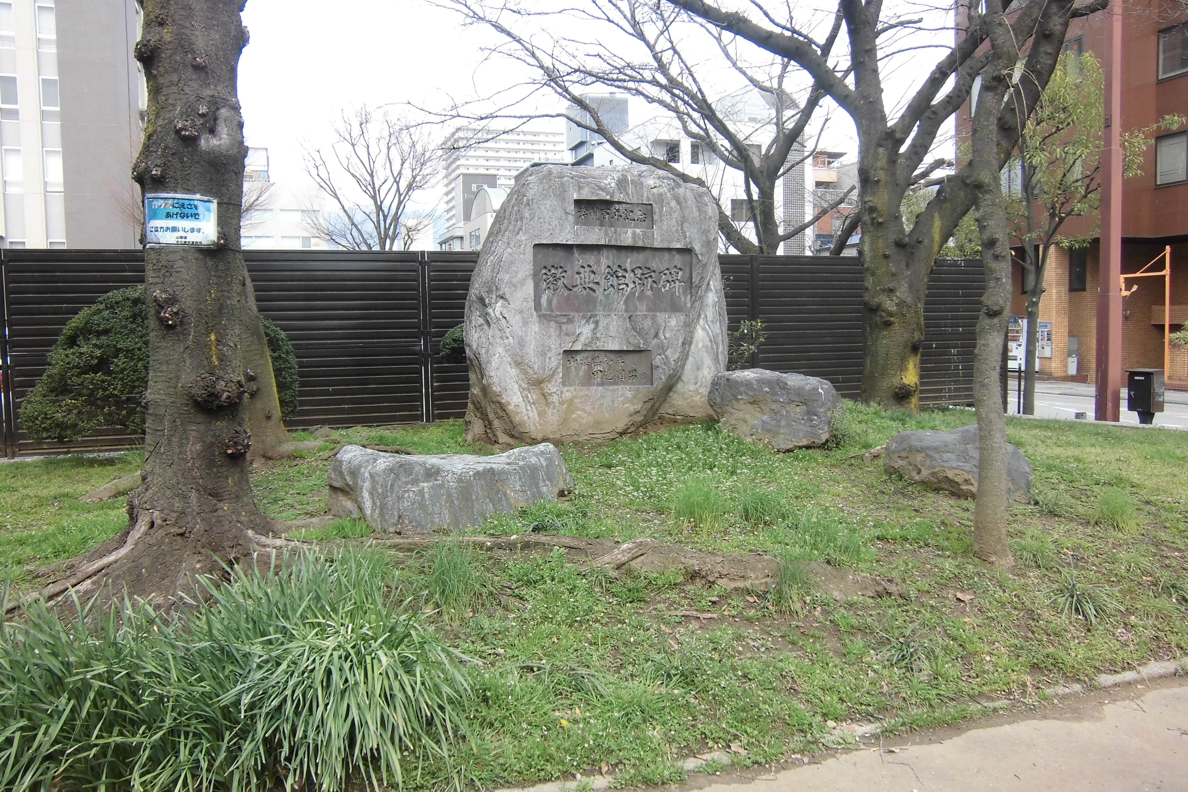 徽典館跡碑（山梨県甲府市中央・甲府中央公園）